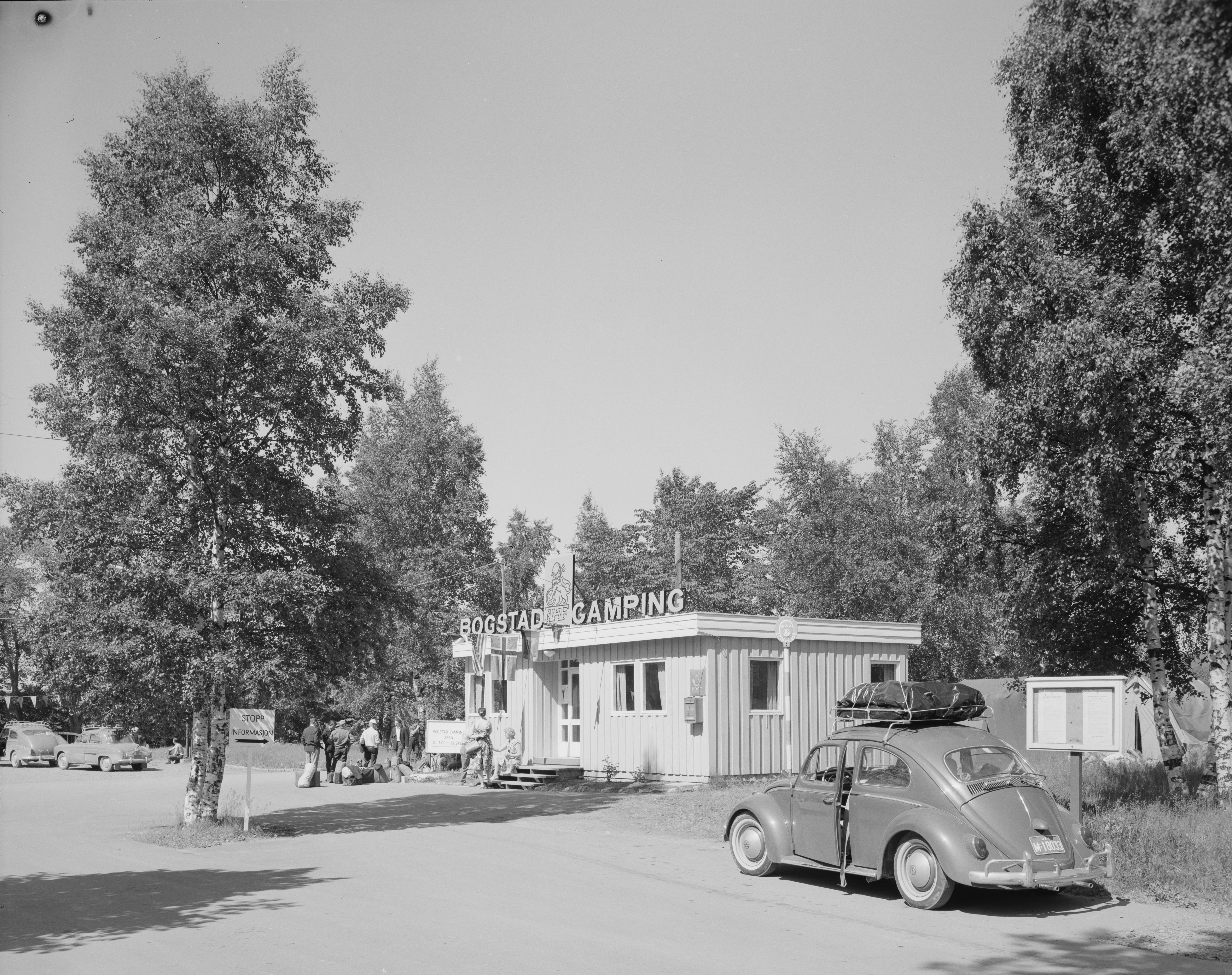 Bildet er hentet fra Nasjonalbibliotekets bildesamling. Anmerkninger til bildet var: fotograf: A.H. Bogstad,Oslo, Oslo, Oslo